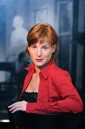 Lenka Krobotová (nar. 1977) je česká herečka.